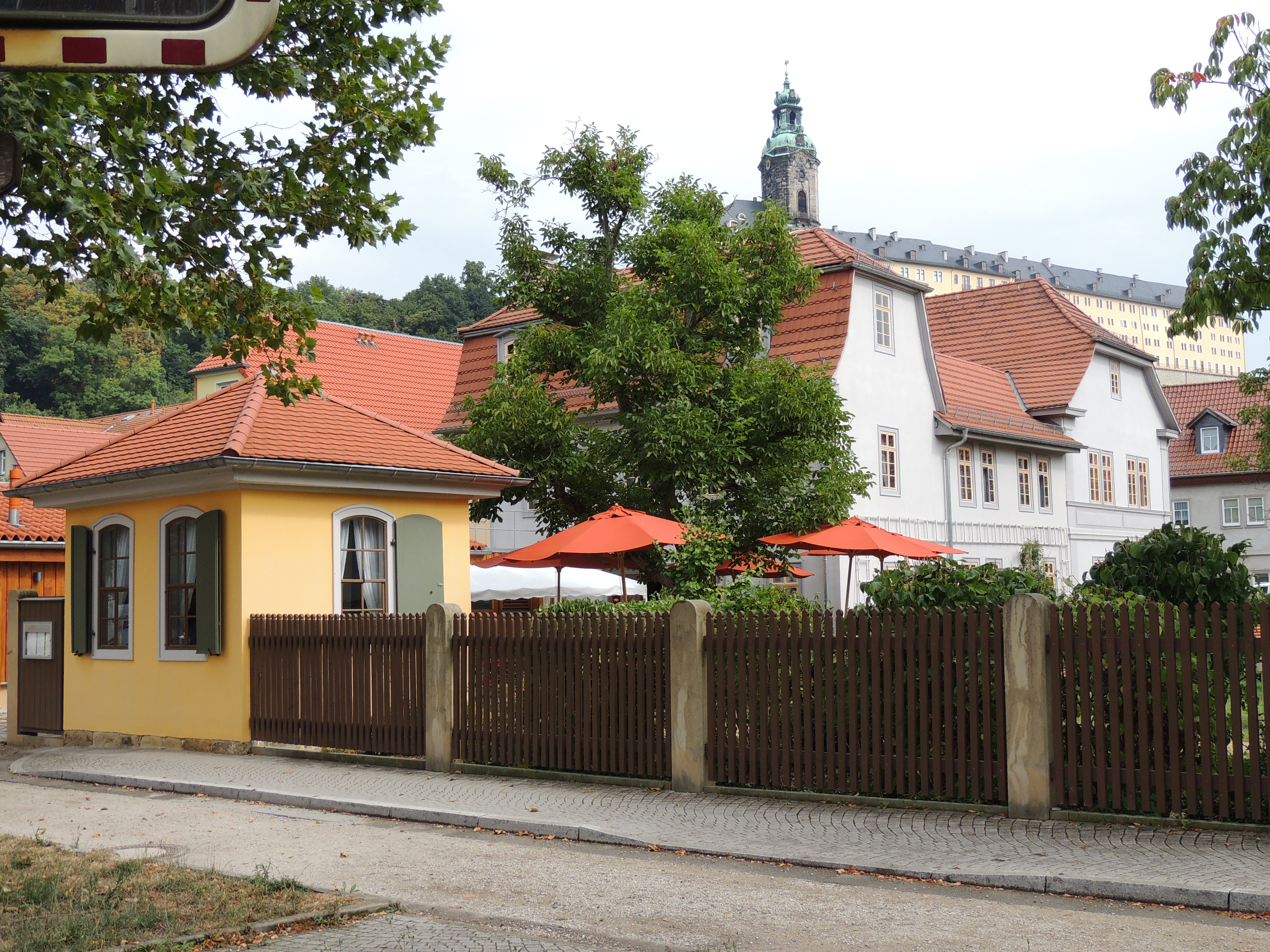 Denkmalgeschütztes Gebäude Schillerstraße 25 in Rudolstadt, Teehaus; Ansicht Große Allee; Schillerhaus